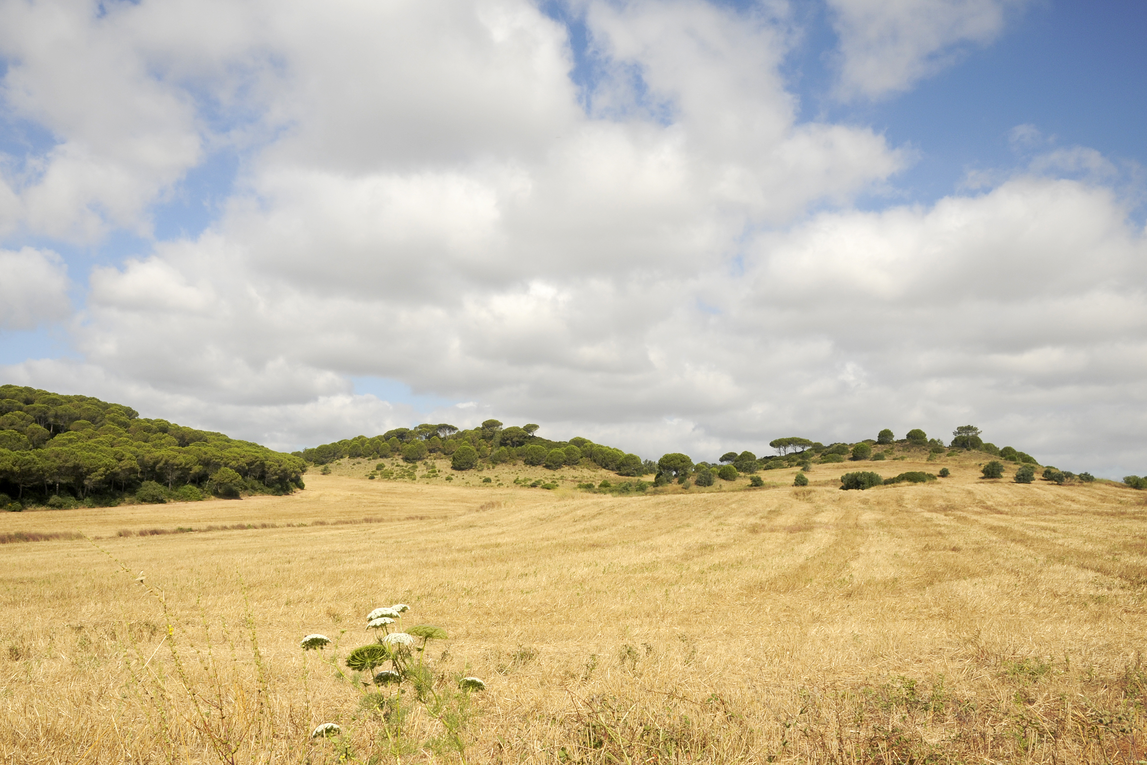 Serra da Arrábida